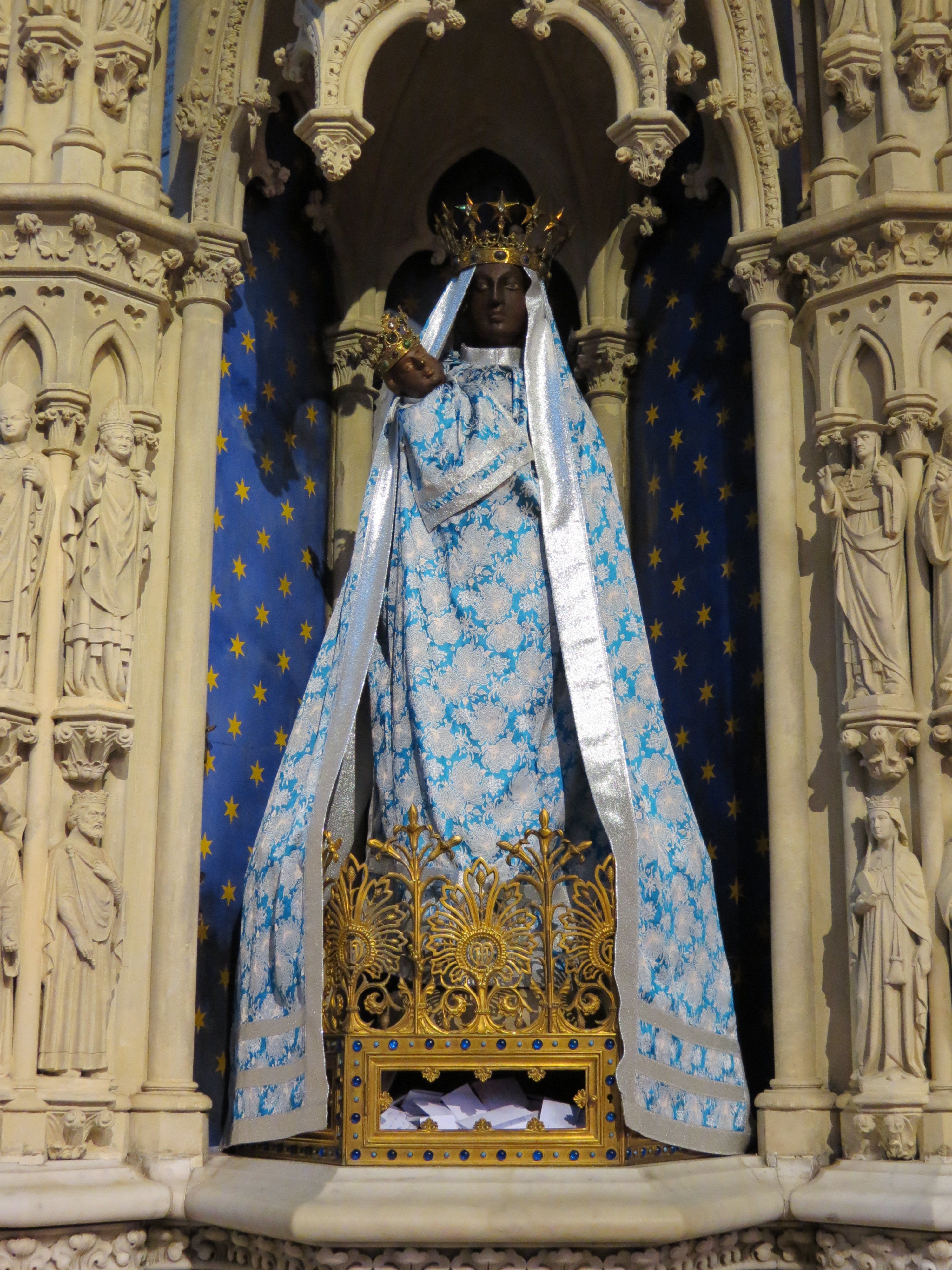 Basilique Notre-Dame de la Délivrande.